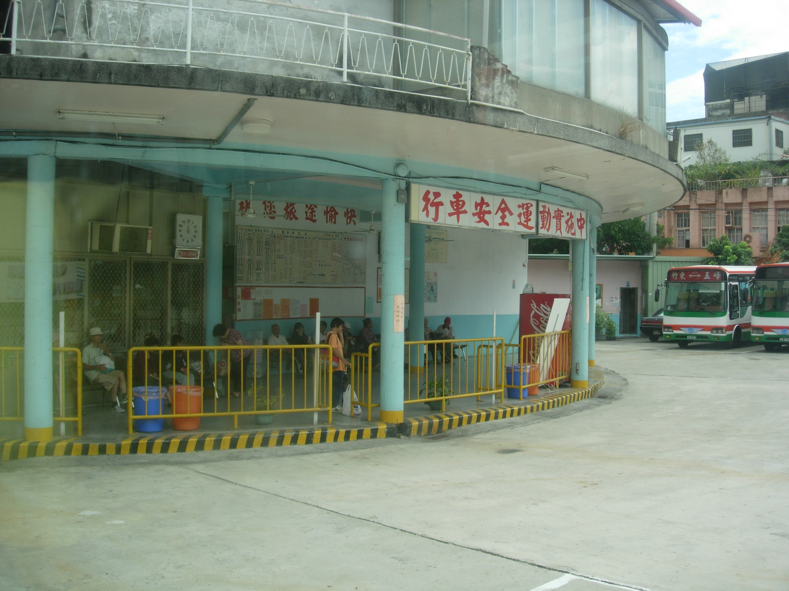 中文（台灣）: 新竹客運竹東站月台外觀